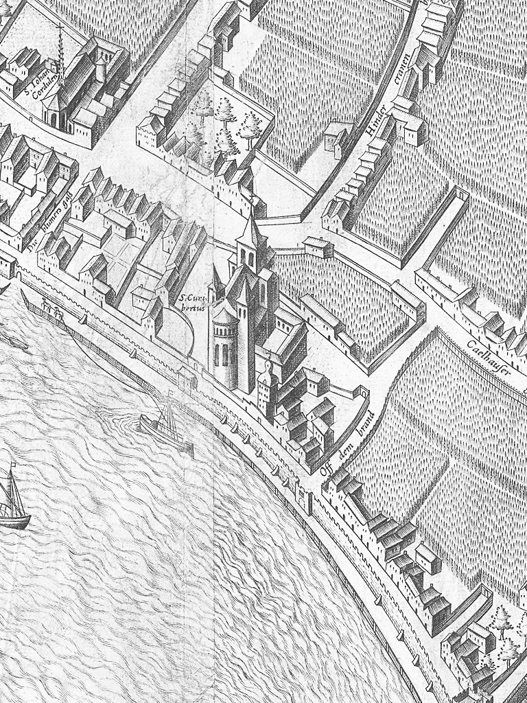 Ausschnitt des Mercator – Stadtplanes Köln. Bereich „Sankt Kunibert und Propsteianlage um 1571“